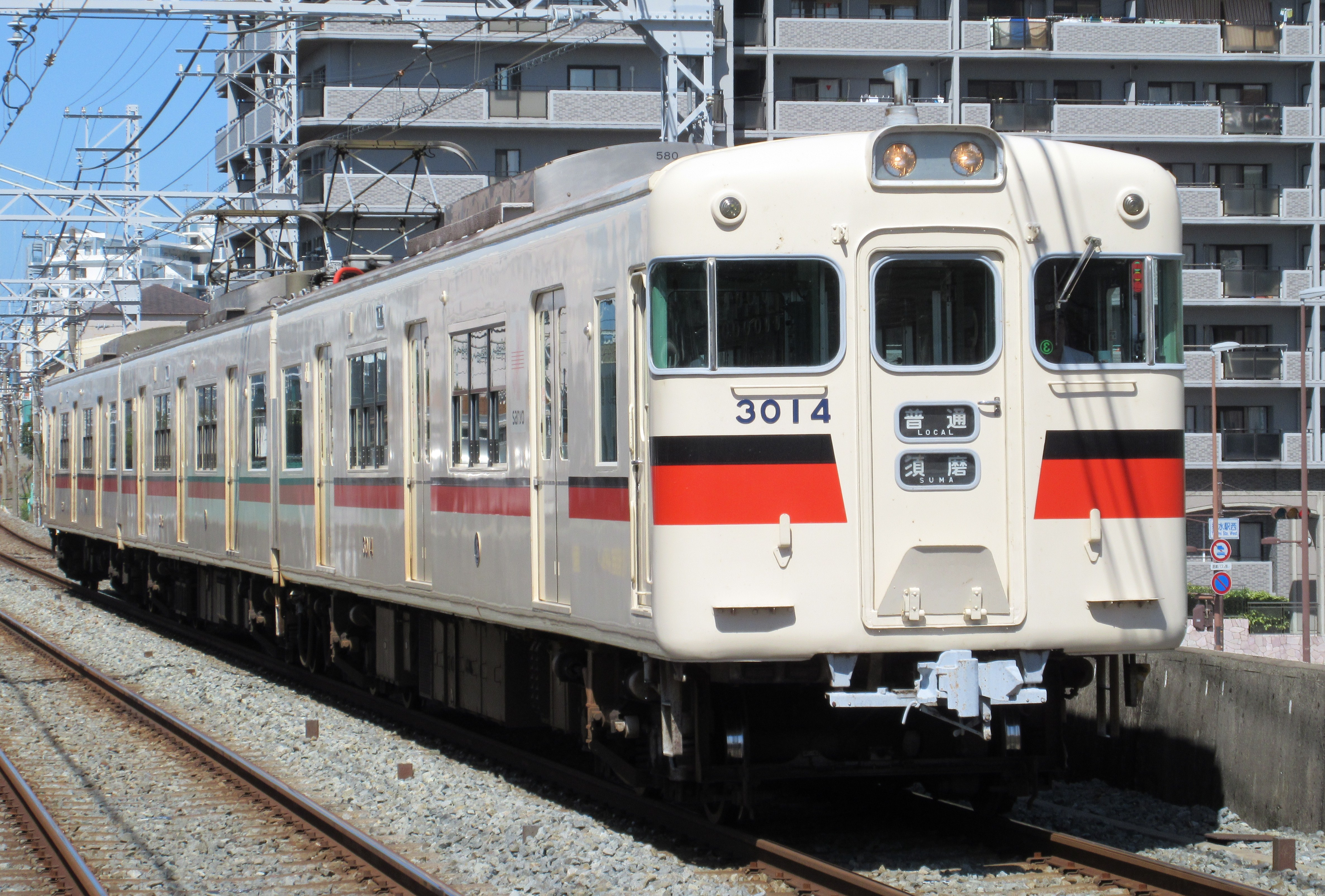 山陽電鉄3014編成(垂水駅にて)